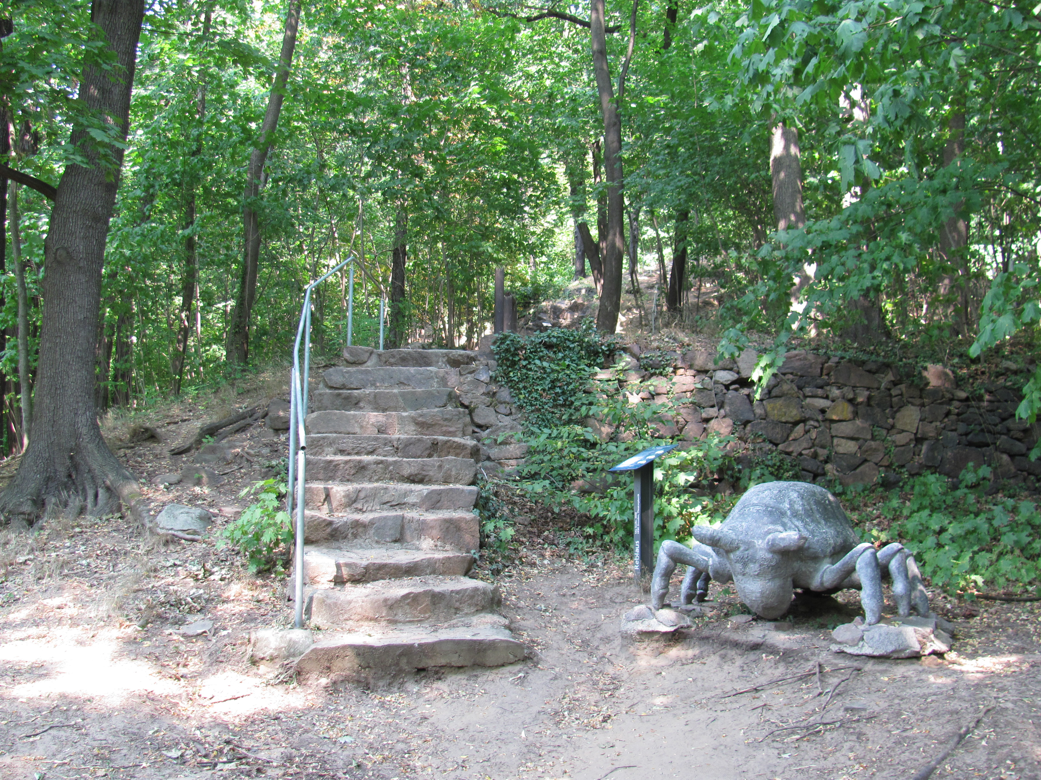 Radebeul-Oberlößnitz, Villa Wach, Sandsteintreppe mit Reblaus am Bergpfad